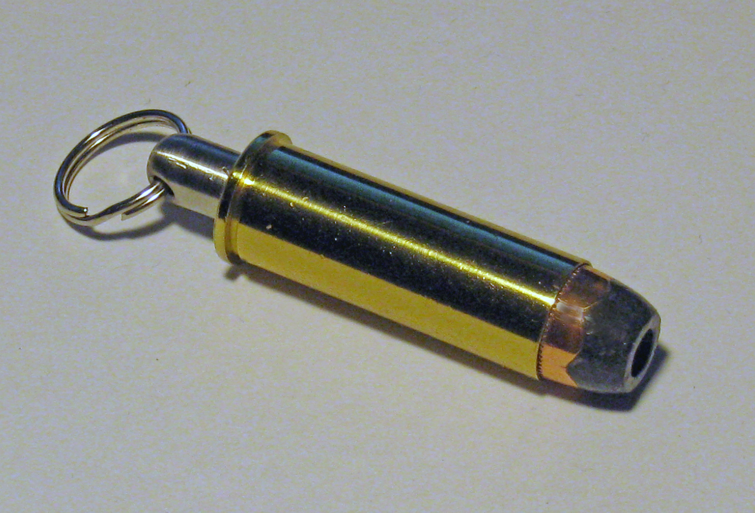 Revolverpatrone Kaliber .44 als Schlüsselanhänger, fotografiert in der Festung Heldsberg, St. Margrethen, Kanton St. Gallen